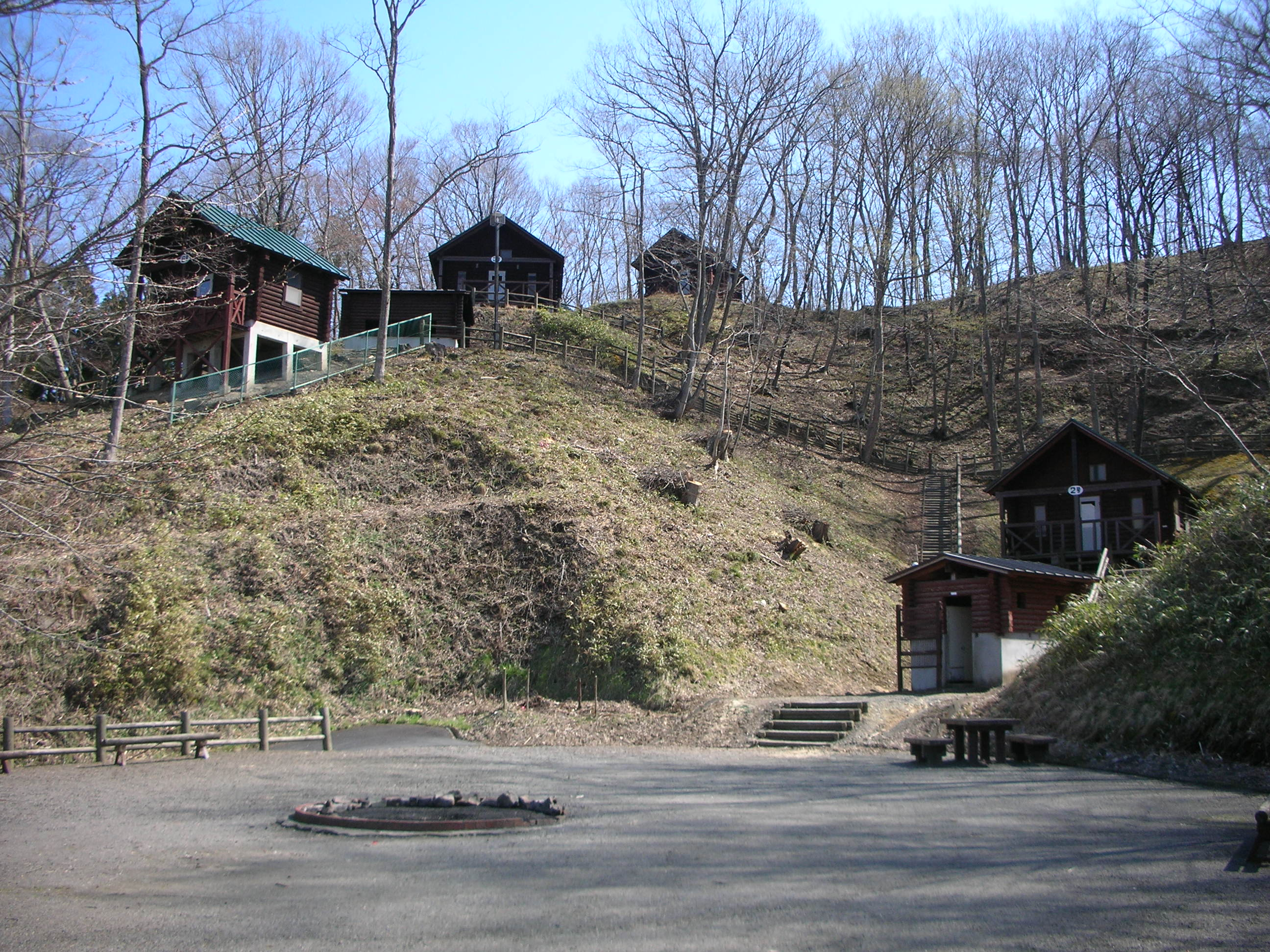 七ツ森湖畔公園